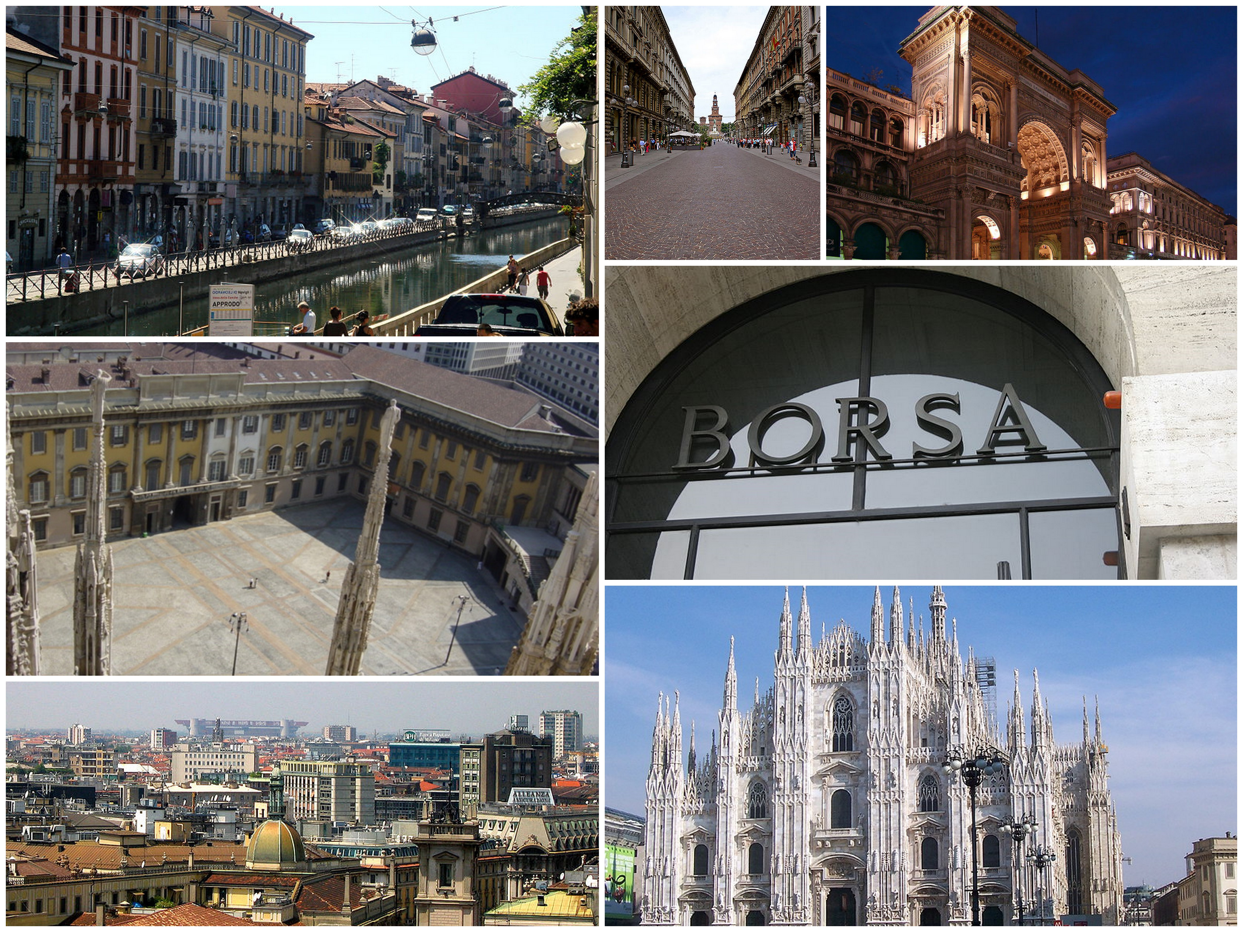 Collage di varie foto di Milano